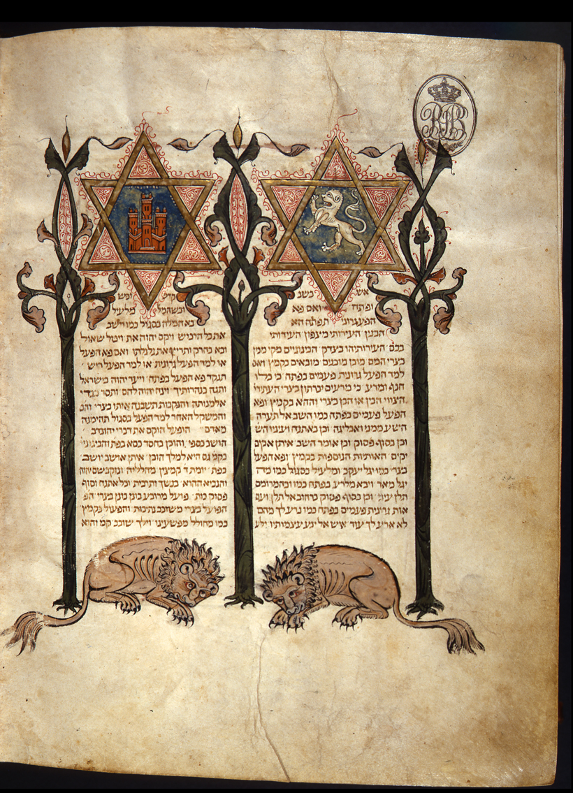 Bíblia de Cervera, Colofon e armas de Castela e Leão (fl 448v)